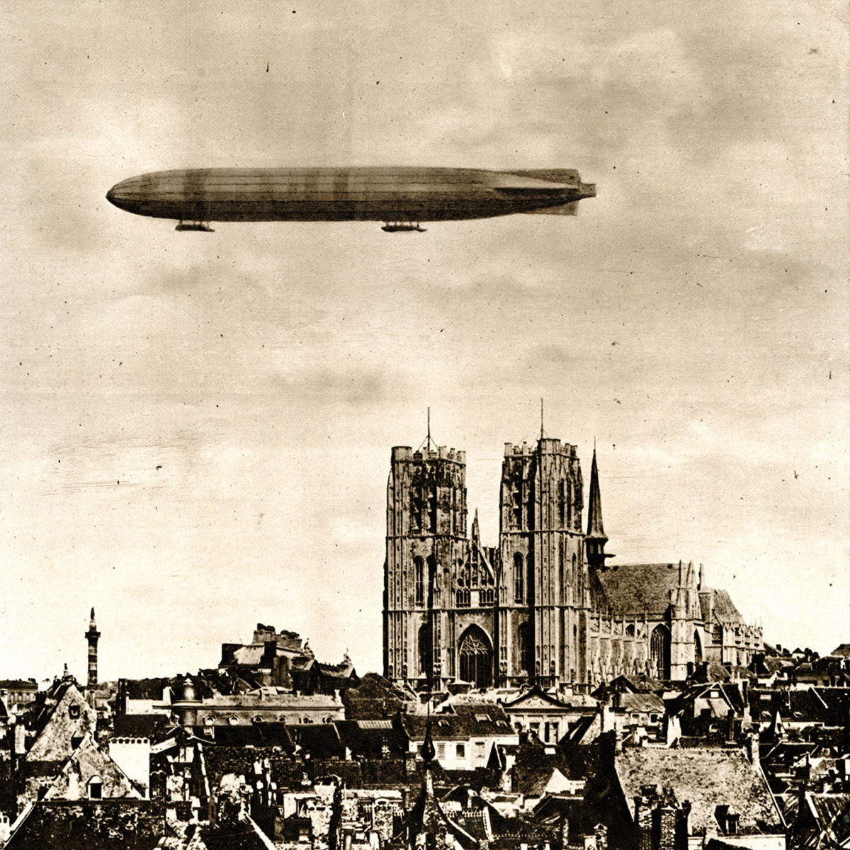 Zeppelin boven Sint Goedele in WOI